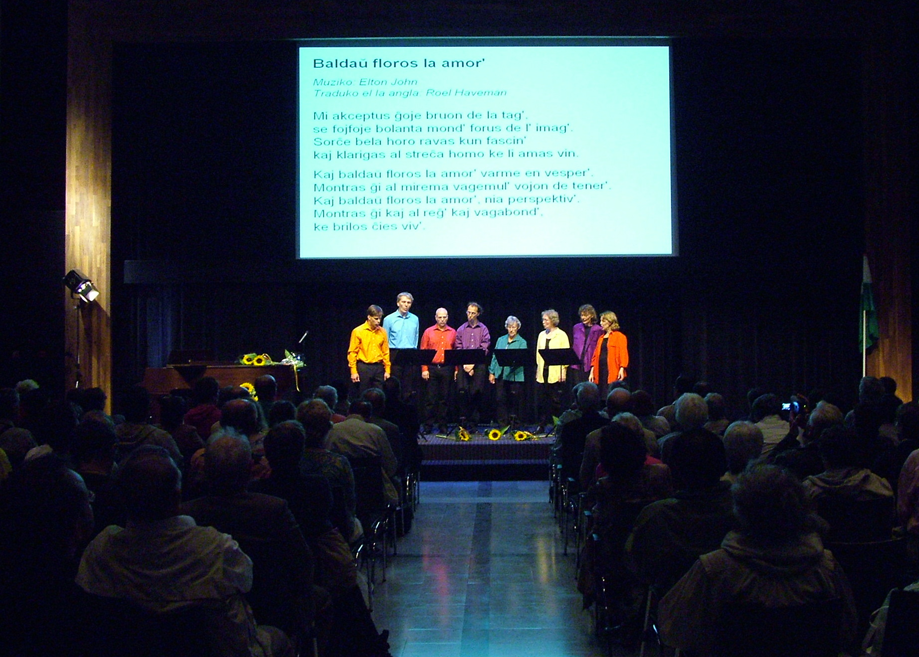 Universala Kongreso de Esperanto, Roterdamo 2008. "Akordo"